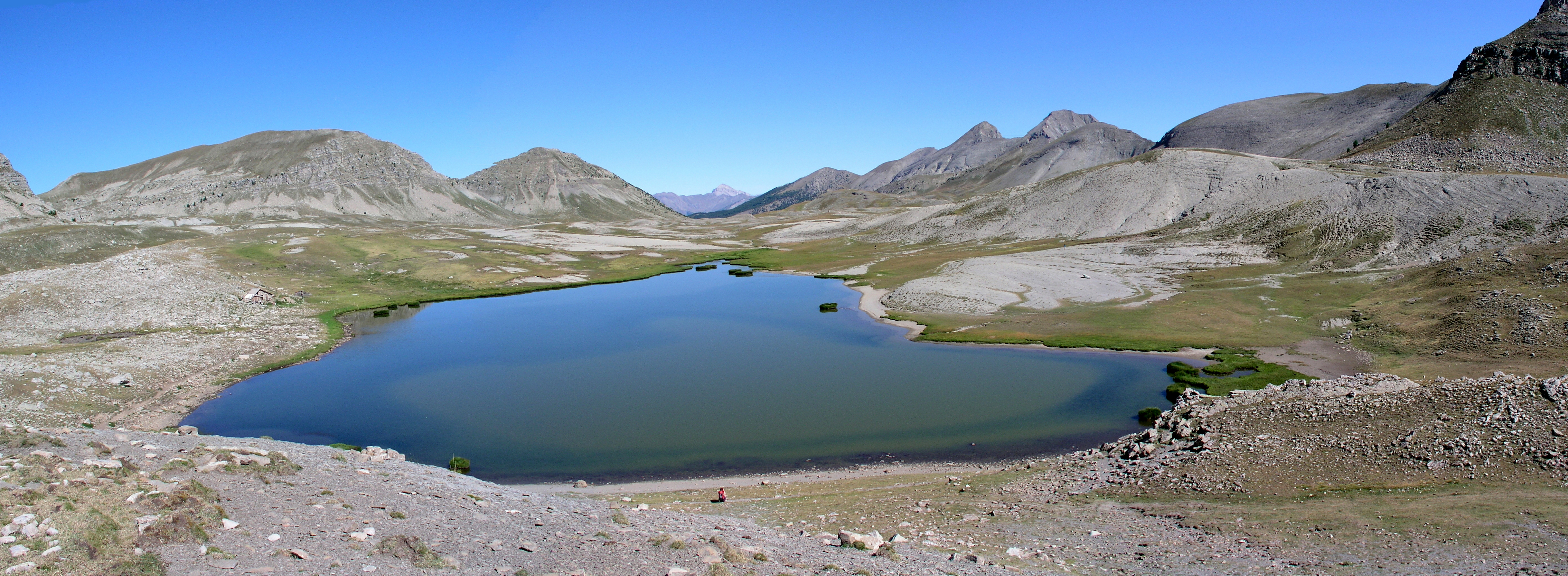 Lac de Lignin